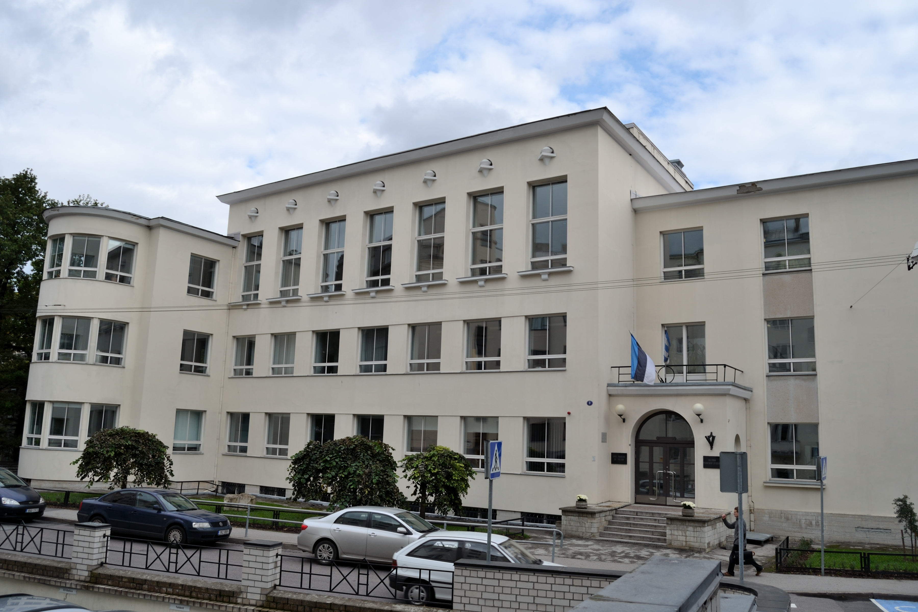 Tallinn, koolihoone Hariduse 3, 1937